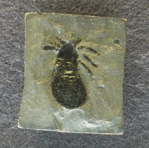 Fossil of Cryptomartus, an extinct arachnid- Took the photo at Senckenberg Museum of Frankfurt